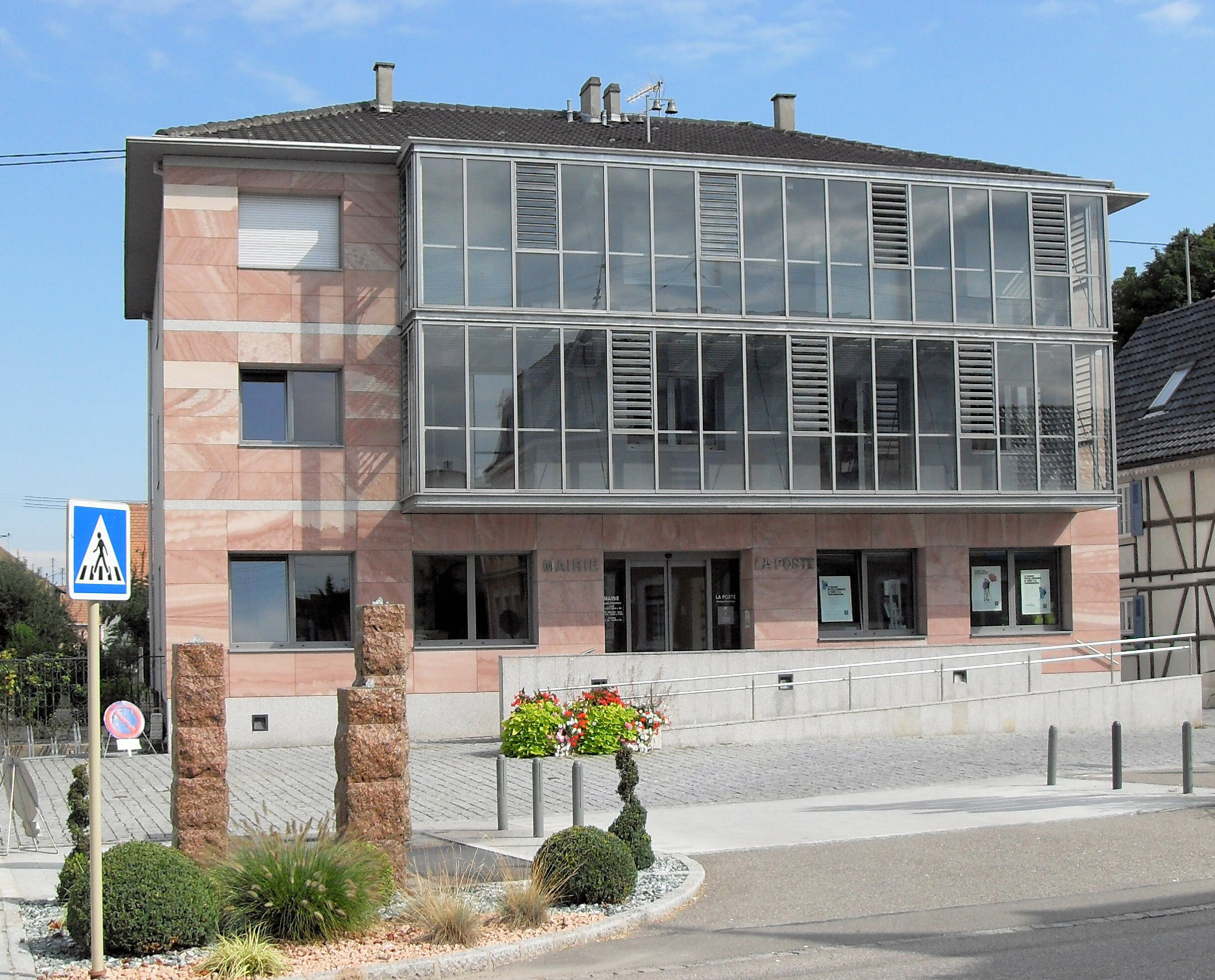 La mairie de Blotzheim